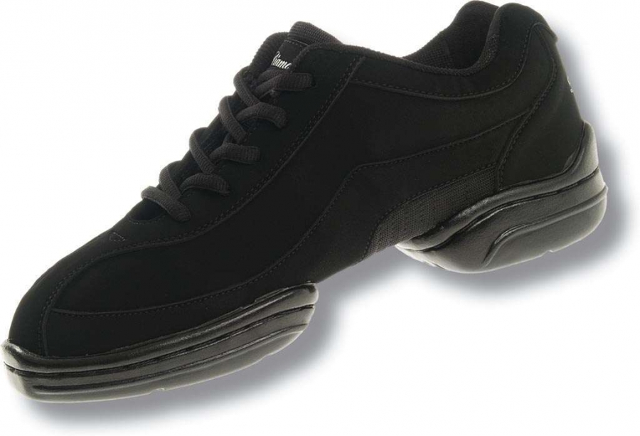 ArtNr. DDS007-040 Sport Sneaker 007 mit geteilter Sohle schwarz Nubuk Synth.